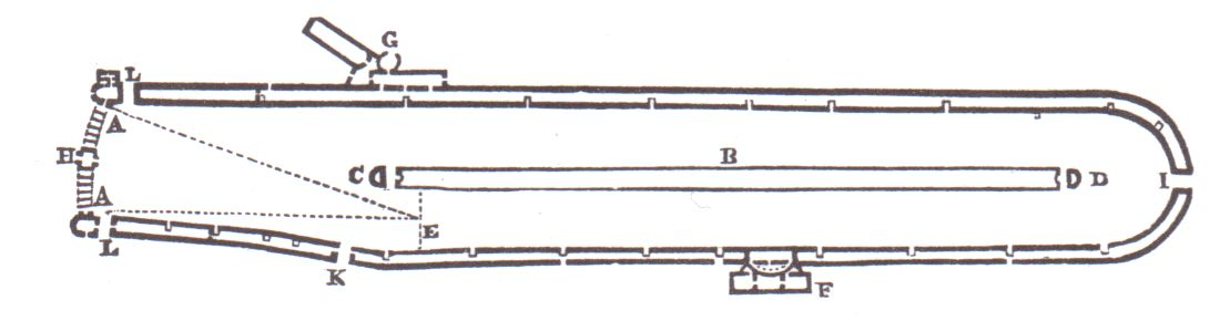 Grundriss des Circus des Maxentius (bis ins 19. Jh. des Caracalla) an der Via Appia in Rom. A Pferdeställe B Spina (Zwischenwand) C Meta prima (1. Wendemarke) D Meta secunda (2. Wendemarke) E Alba linea (Start) F Tribüne des Kaisers G Tribüne für den Beamten, der das Rennen finanziert H Porta pompa (Eingang) I Porta triumphalis (Ausgang für den Sieger) K Porta libitinensis (Tor für Wegtransport der verwundeten oder getöteten Wagenlenker) L Eingänge für die Wagen.